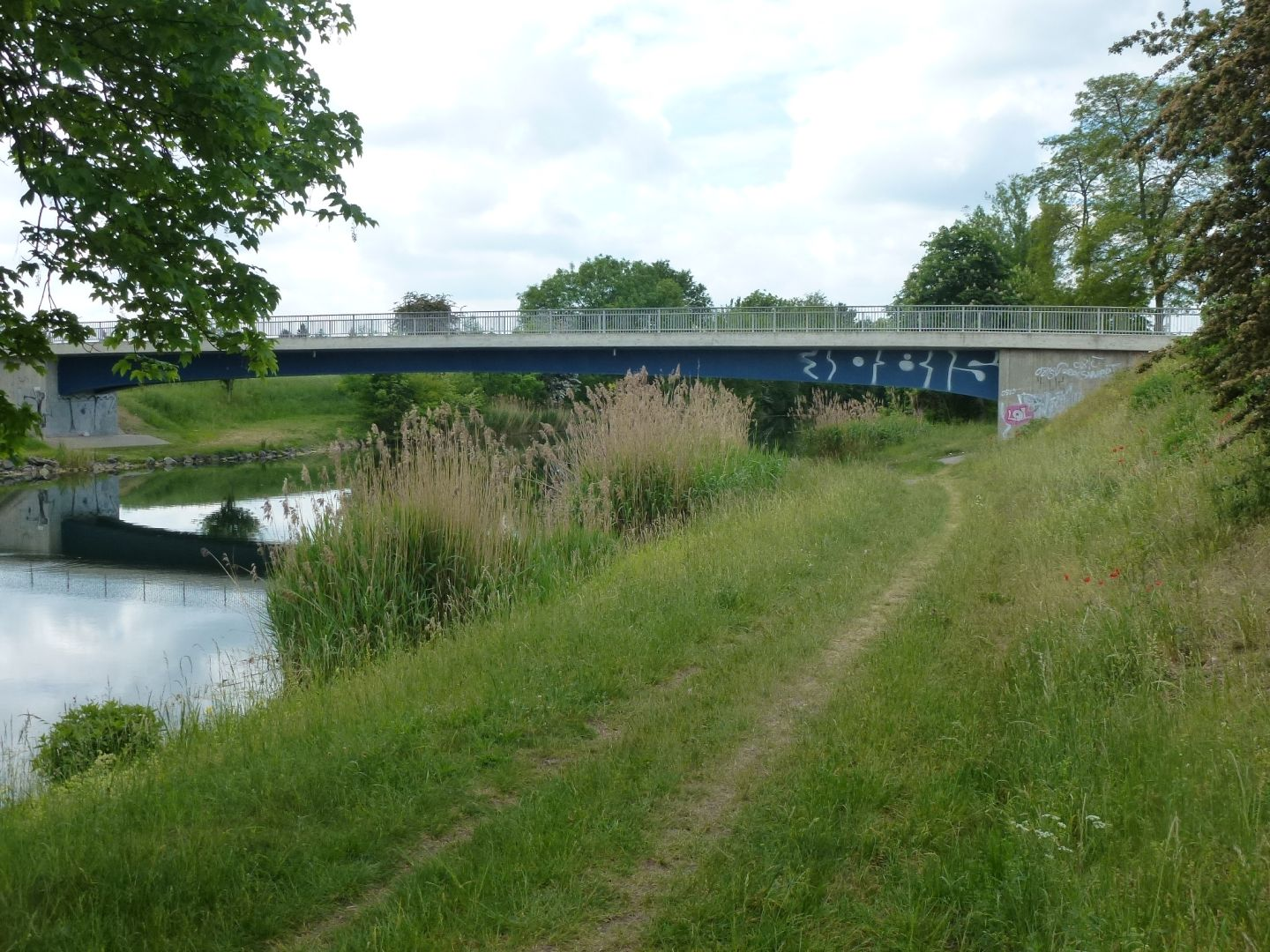 Brücke der Straße bei Kötschlitz über den Elster-Saale-Kanal